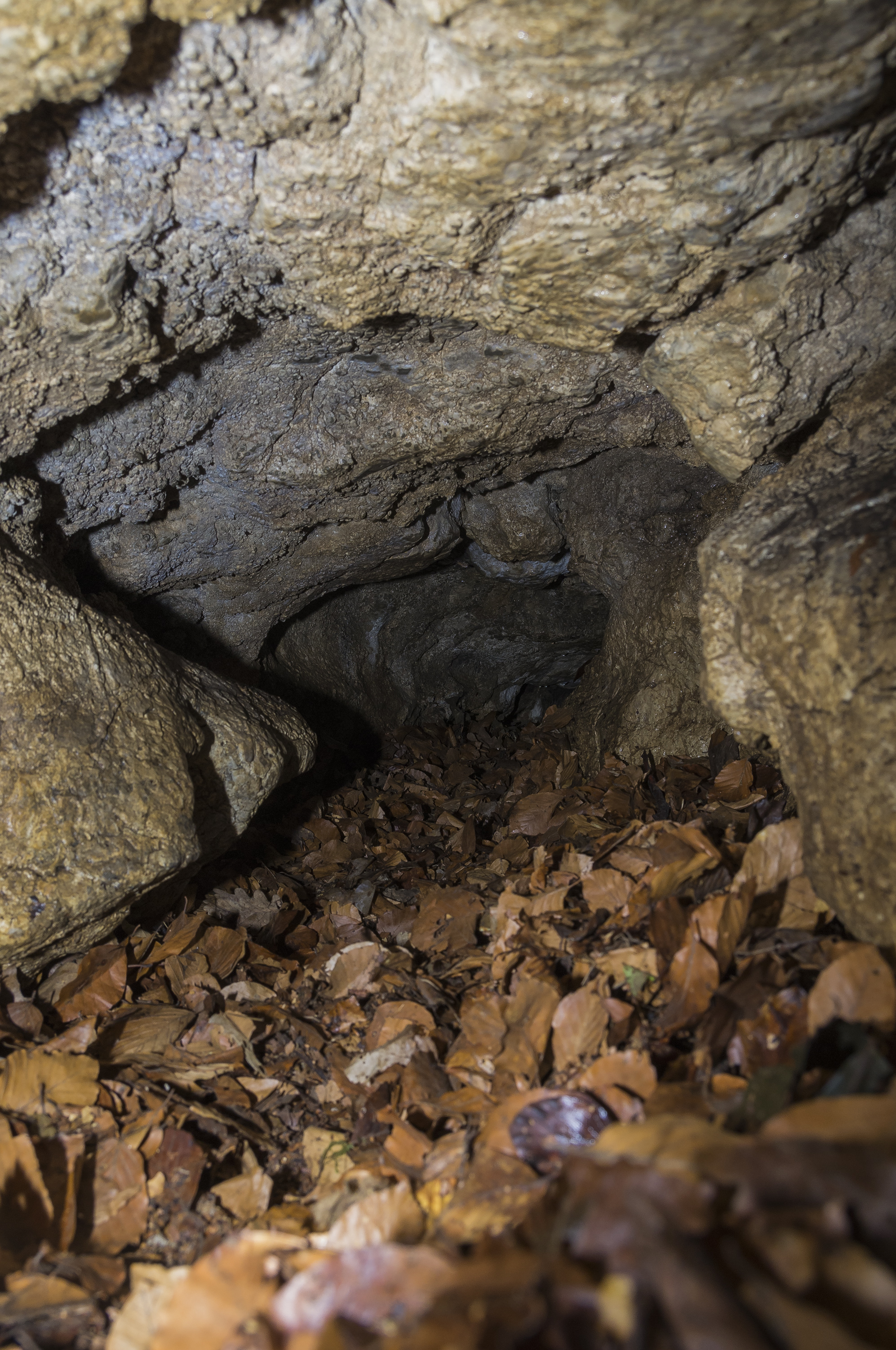 Jaskinia bez Nazwy w Wąwozie Żarskim